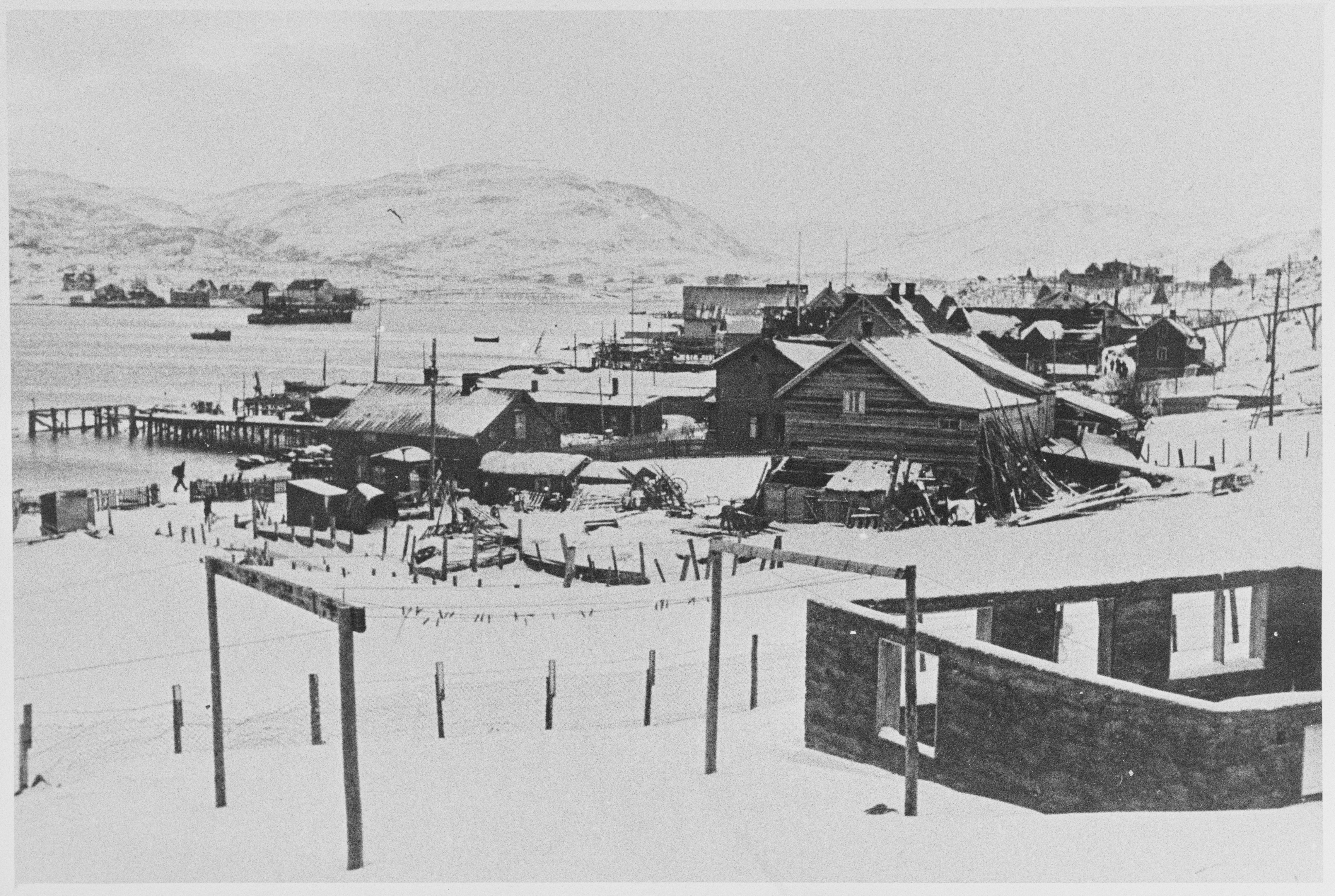 Båtsfjord reddet fra tyskerne - 44